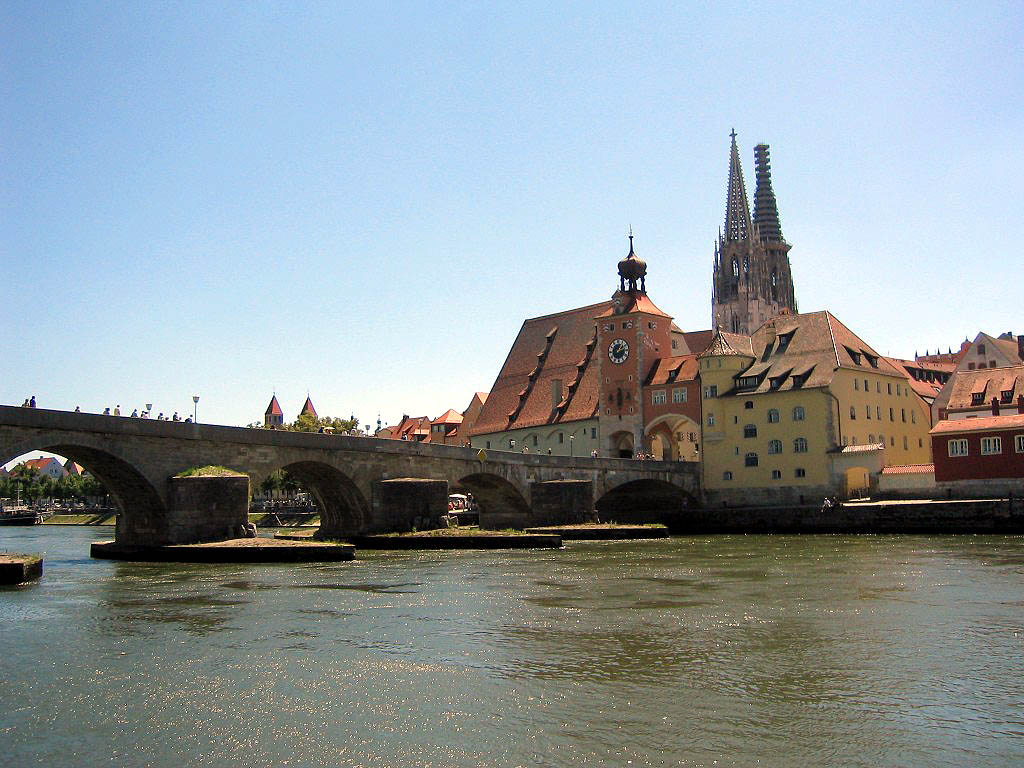 Regensburg (Bayern): Ansicht der Steinernen Brücke und des Doms (Blick von der Donau aus Richtung des Unteren Wöhrds, einer der beiden großen Donauinseln) Bildautor: Hytrion - Aufnahmedatum: unbekannt (eingestellt am 17.07.2004) - Lizenz: Public Domain (Nachbearbeitet von wolpertinger - Originalbild Regensburg_-_Steinerne_Bruecke.jpg hier.) Mehr Bilder aus Regensburg: Ein Abend an der Donau bei der Steinernen Brücke... Als in Regensburg noch Straßenbahnen fuhren - Modell des Arnulfsplatzes um ca. 1960 Meditieren auf Rengschburgerisch: Der Spitalgarten in Stadtamhof an der Steinernen Brücke Das Wohnhaus des Astronomen Johannes Kepler und seiner Familie von 1626-1628 Denkmal des Don Juan d'Austria, Sieger in der Seeschlacht von Lepanto Die Kaiserherberge am Haidplatz Der Erker des Reichstagssaals Sitzung des Immerwährenden Reichstags in Regensburg im Jahr 1640 Die Neugestaltung des Neupfarrplatzes Mitte der 90er-Jahre fand nicht nur ungeteilte Zustimmung... Der Brückturm neben dem Salzstadel (2) Die historische Wurstküche ("Wurstkuchl") am Marc-Aurel-Ufer Das Ostentor Die Porta Praetoria (2) Das "Bruckmandl" (Brückenmännlein) in der Mitte der Steinernen Brücke Zeugl (bair. für "Aushängeschild") des historischen Lokals "Zum Walfisch" Die Ostseite der ehemaligen romanischen Kapelle St. Georg und Afra Dom St. Peter (2) Regensburg (Bayern): Der Biergarten im Bischofshof neben dem Dom (2) Gedenktafel für Oskar Schindler, der nach dem Krieg in Regensburg wohnte Der fast überfüllte Bismarckplatz während des Bayerischen Jazzweekends 2004 Der renovierte Hauptbahnhof (November 2004)